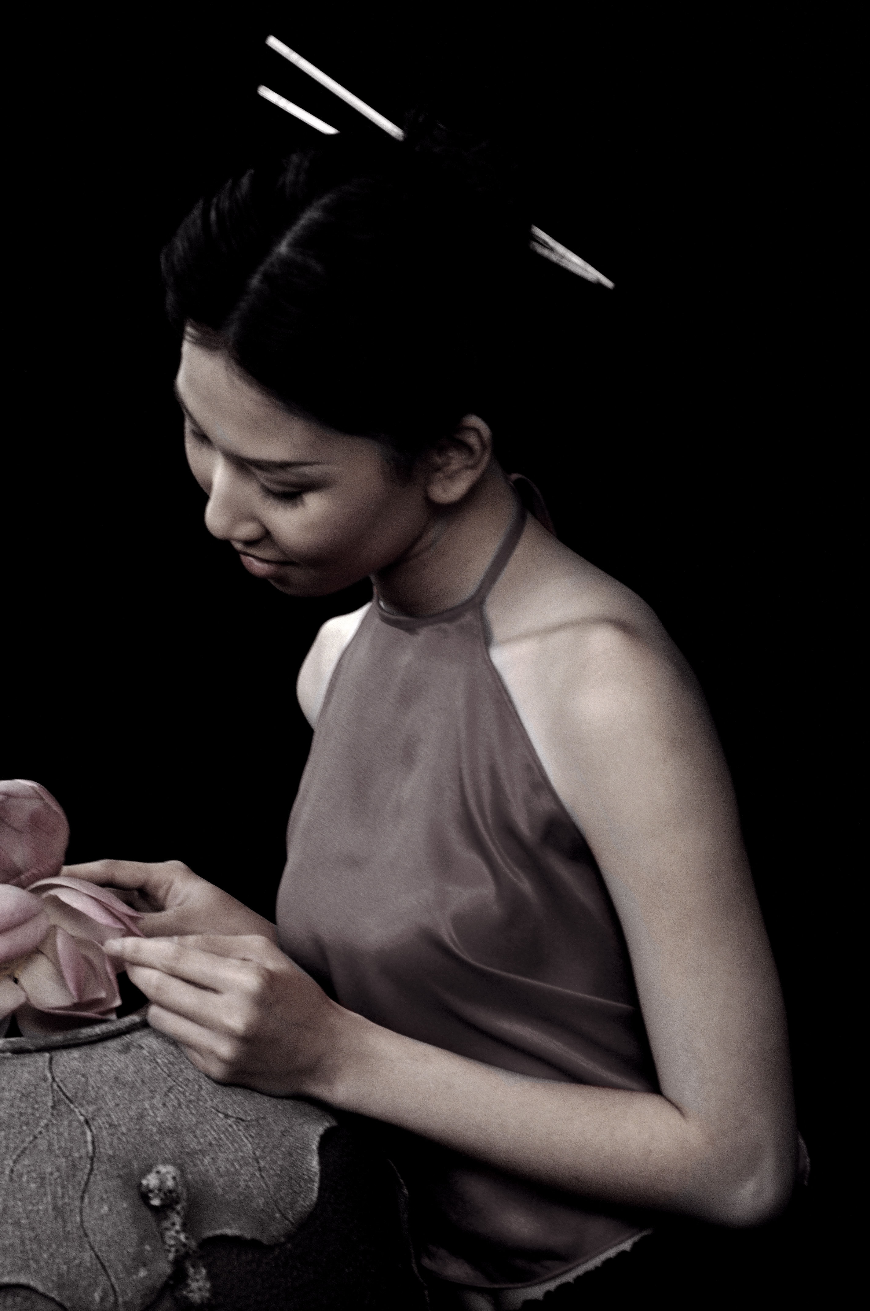 Yếm đào